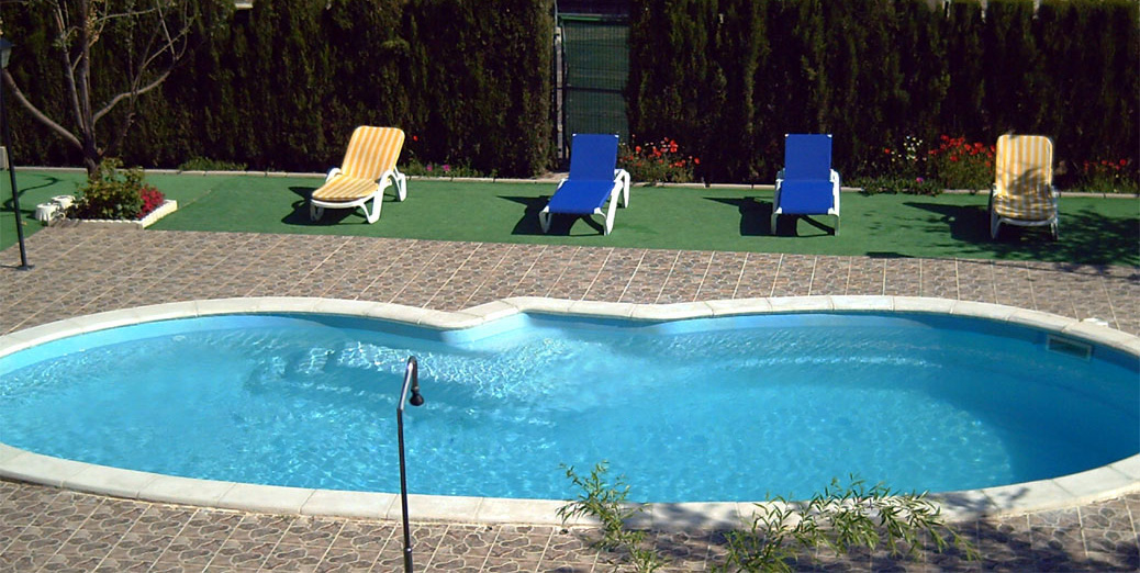 Casas rurales en Castilla la Mancha CASA DE PACAS, casa rural con encanto, de alquiler completo, totalmente climatizada y equipada, situada en una finca de 6000 mts en Bolaños de Calatrava y a tan solo 3 Kms de la monumental ciudad de Almagro - Ciudad Real (España). Disfruta el fin de semana del turismo rural, en Casa de Pacas encontrarás todo lo necesario: Zonas de Ocio, piscina privada, pista de padel, barbacoa, amplio salón con chimenea , jardines.. conoce las rutas del Quijote en bicicleta, o simplemente relajaté jugando al futbolín o al ping-pong. CASA DE PACAS es un centro estratégico para visitas al Castillo de Doña Berenguela en Bolaños ( Ciudad Real ), Corral de comedias, Museo nacional del teatro, Museo del encaje, Palacios y Conventos en Almagro - Rutas programadas al Parque nacional de las Tablas de Daimiel y Parque nacional de Cabañeros - Ruta de los caballeros, visitando el castillo de Calatrava la Nueva en Calzada de Calatrava - Visitas al Parque Arqueológico de Alarcos en Ciudad Real.